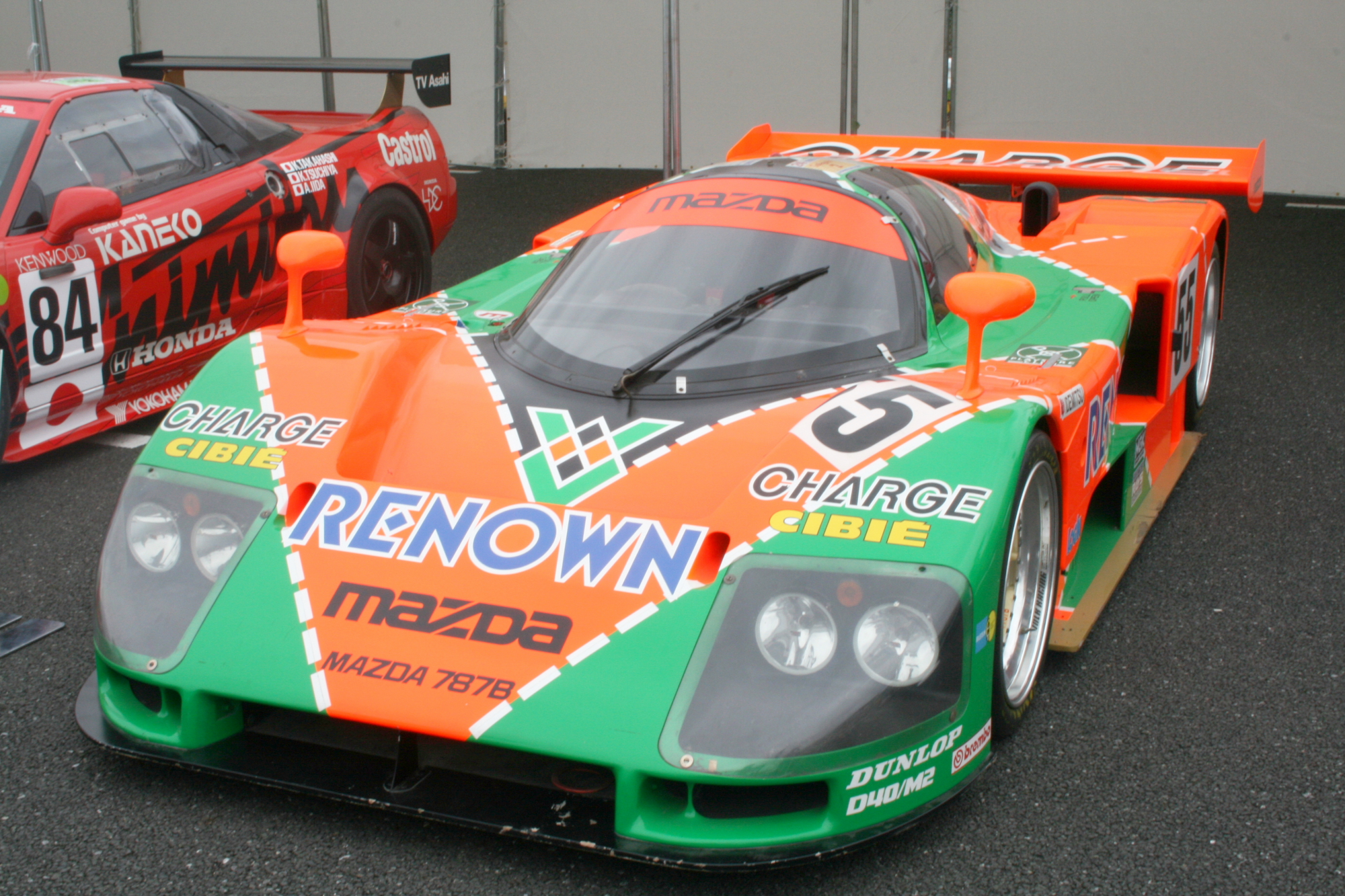 Mazda 787B in Odaiba